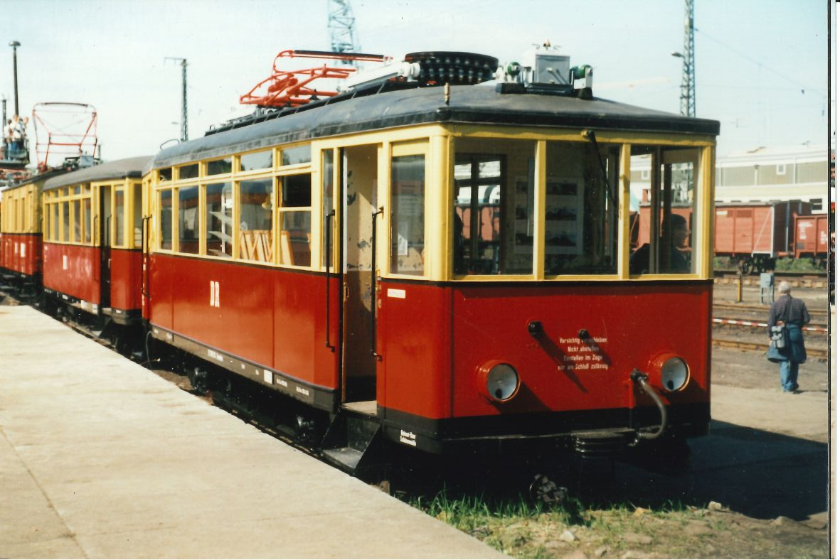 ET 188.5 mit Beiwagen und Gepäcktriebwagen beim Dampflokfest Dresden